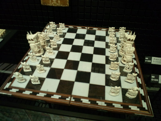 国立民族学博物館（大阪） チャトゥル・アンガム（インド、ラージャスターン州）